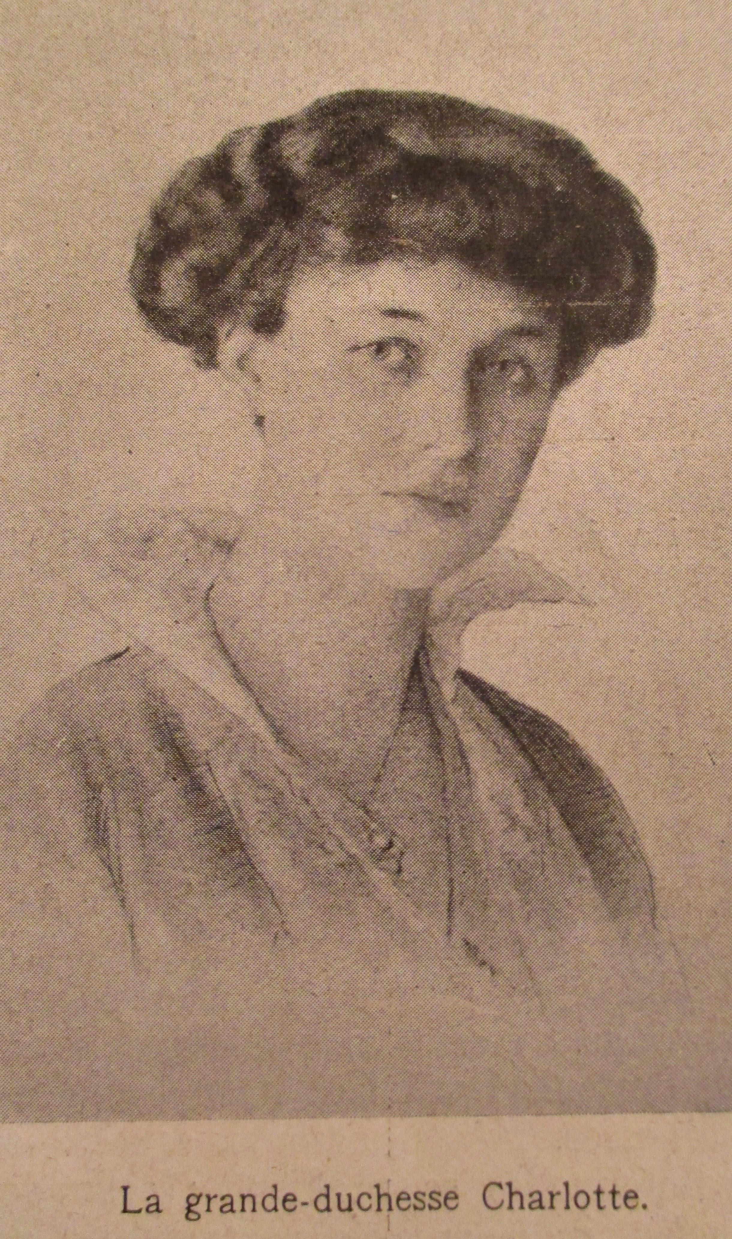 Charlotte de Luxembourg, in L'Illustration, 1919.